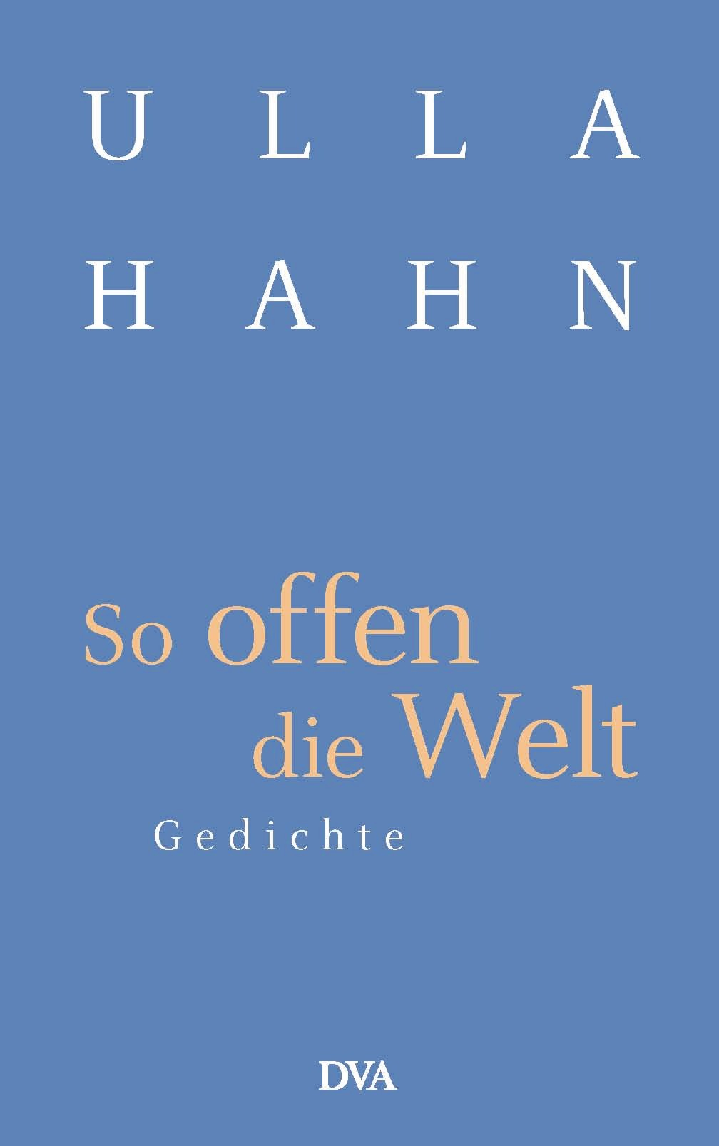 Ulla Hahn: So offen die Welt. Deutsche Verlags-Anstalt, München 2004. DNB